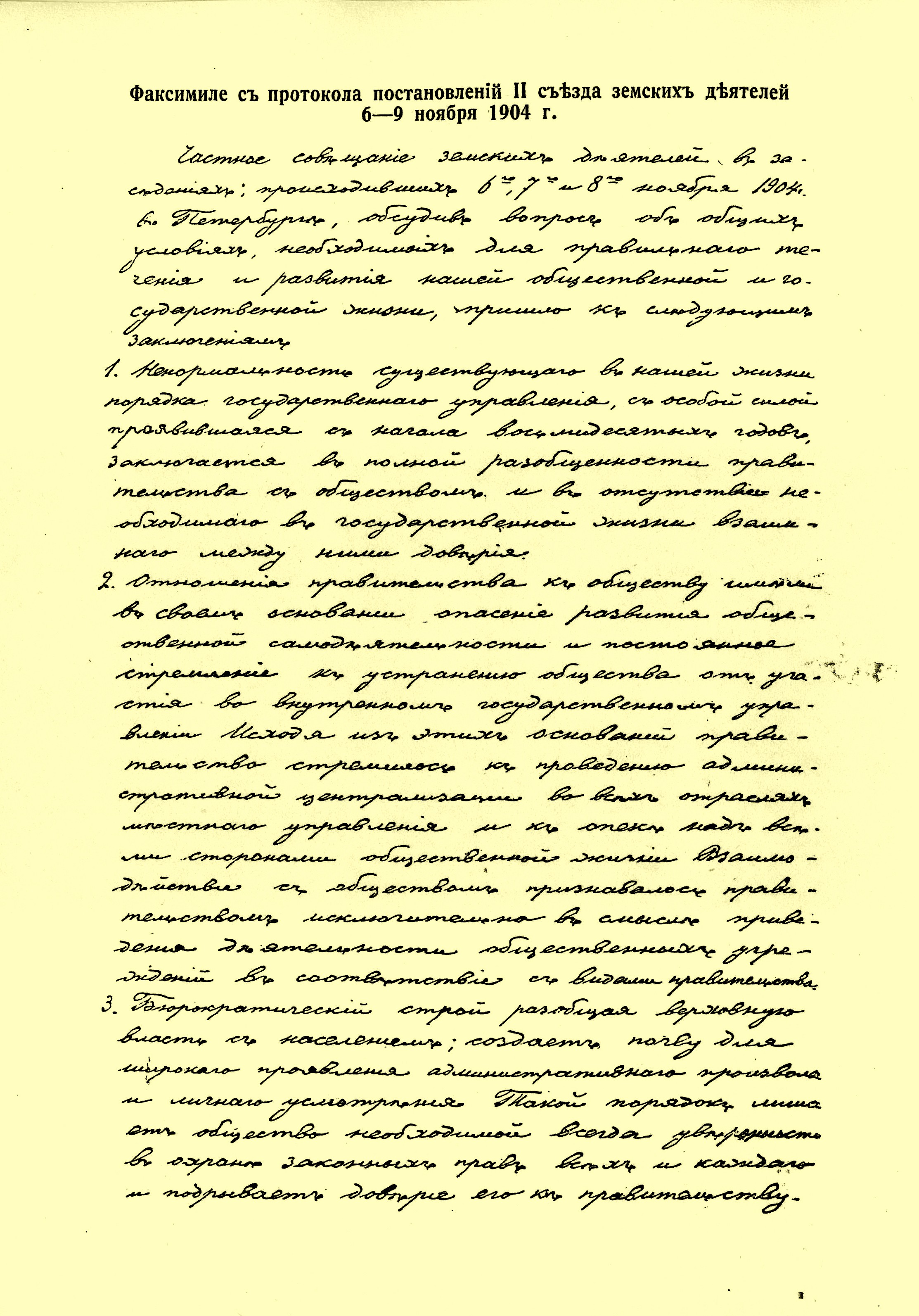 Факсимиле постановления Земского съезда 6-9 ноября 1904 года. Первая страница.